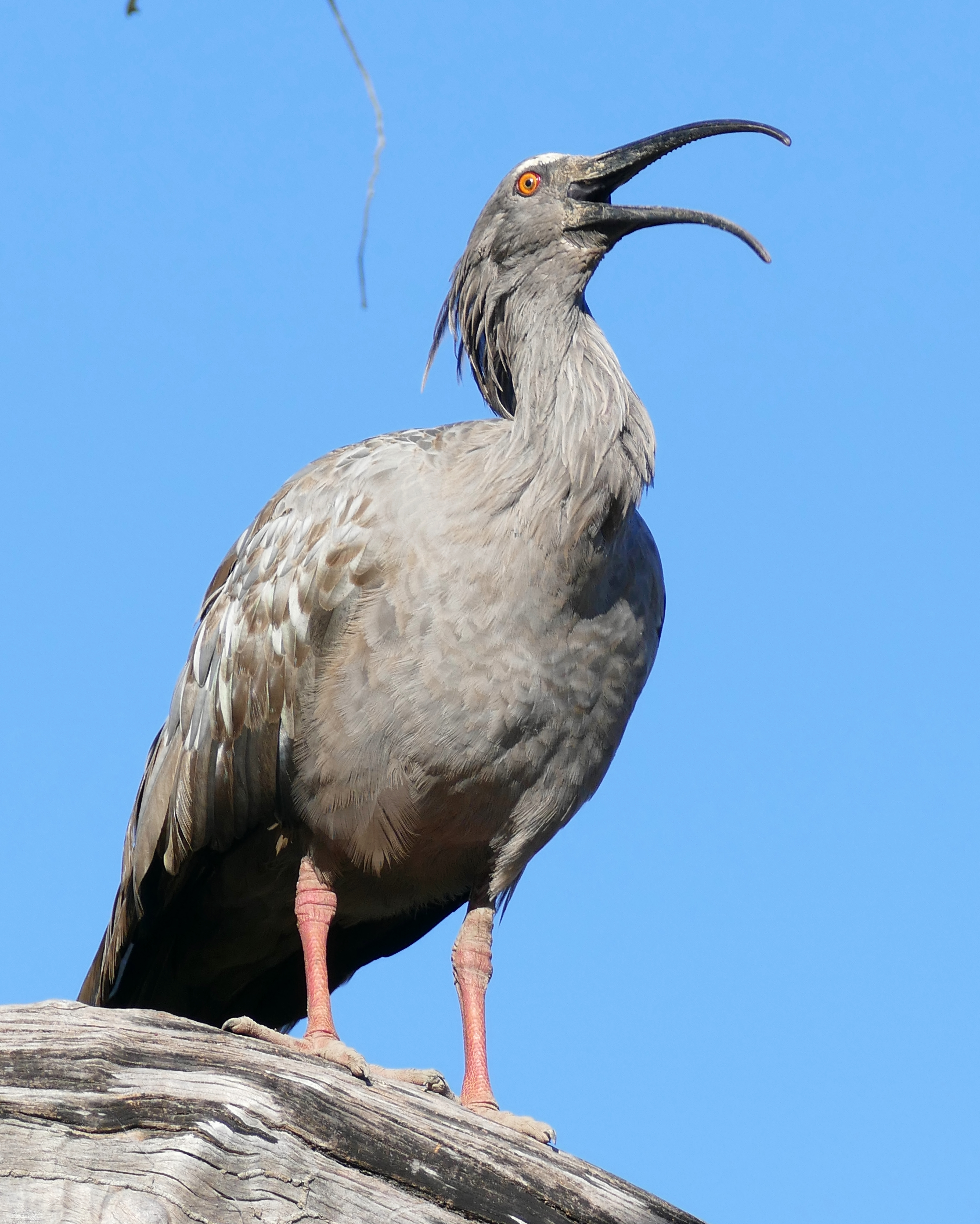 Pouso Alegre, Transpantaneira, Poconé, Mato Grosso, BRAZIL